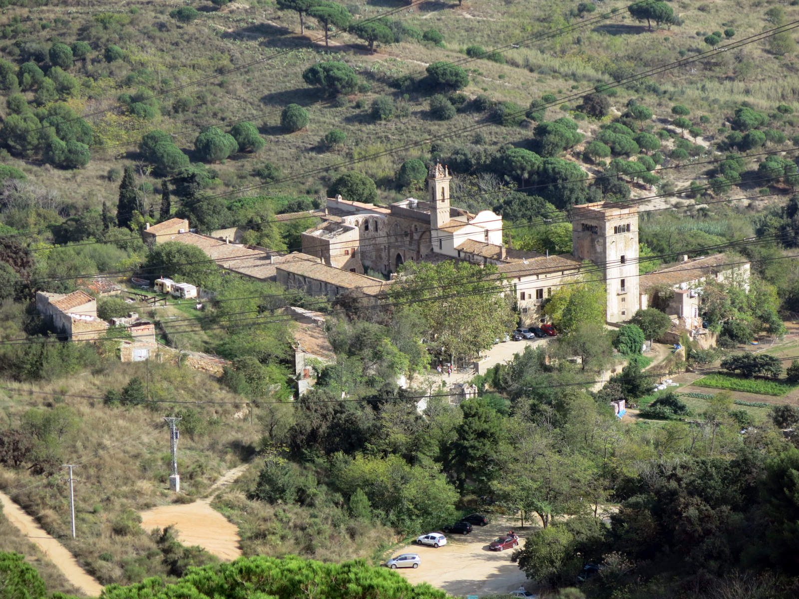 Monestir de Sant Jeroni de la Murtra (Badalona)